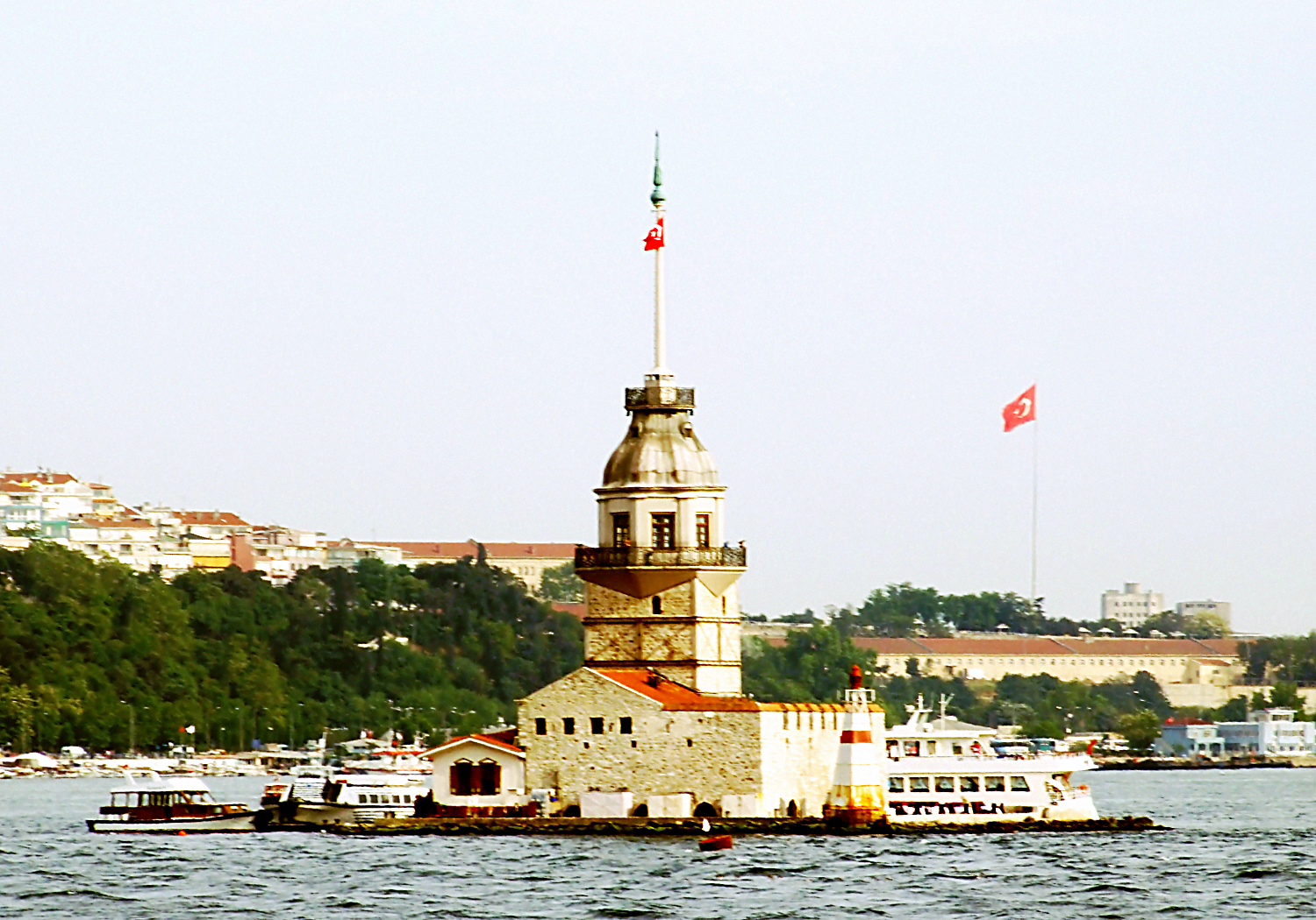 Stambuł, wieża Leandra; Istambul, Kizkulesi (Maiden's Tower)